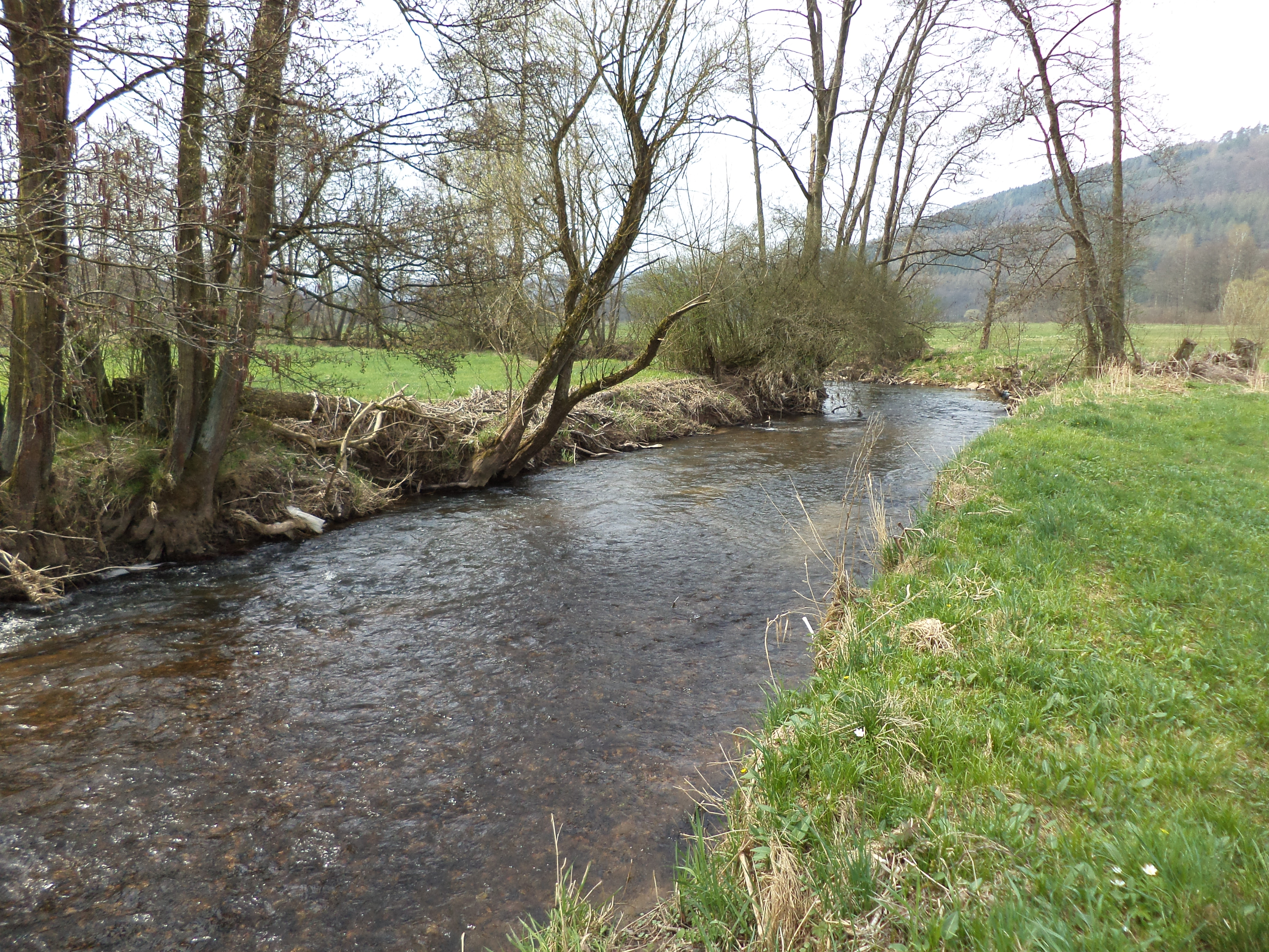 Die Schmale Sinn kurz vor ihrer Mündung in die Sinn